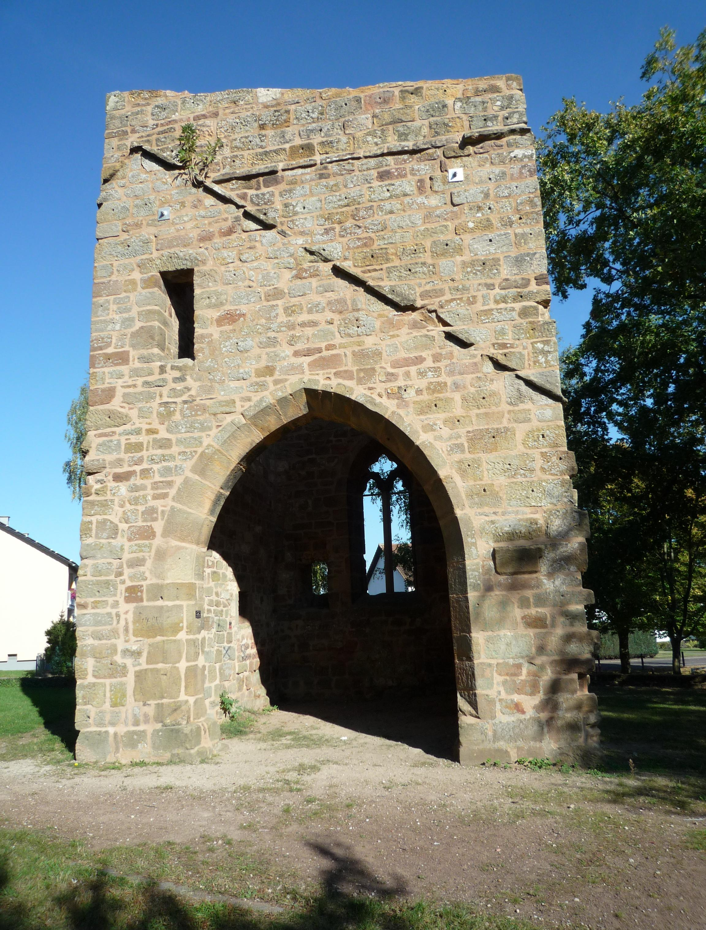 Beeder Turm, gotischer Chorturm in Homburg-Beeden, Deutschland